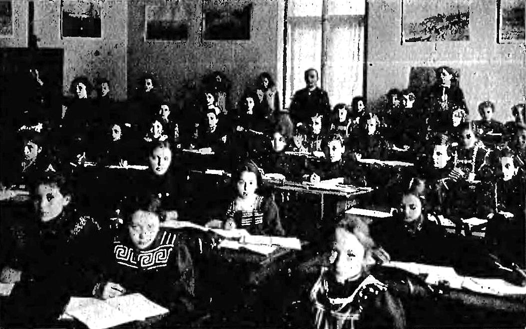 Prywatne Gimnazjum Żeńskie z prawem publiczności Zofii Strzałkowskiej. Lekcja łaciny w I klasie (ok. 1911).